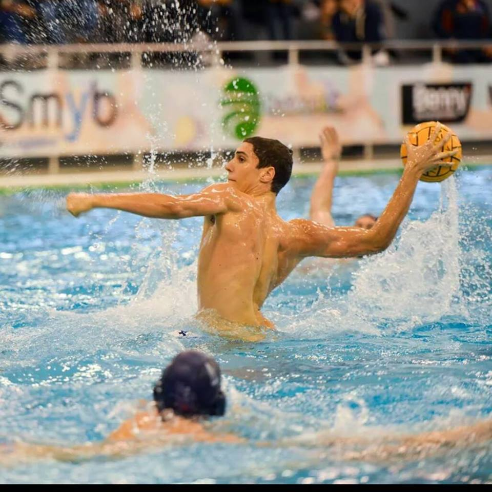 Gaetano Baviera in azione nel 2015